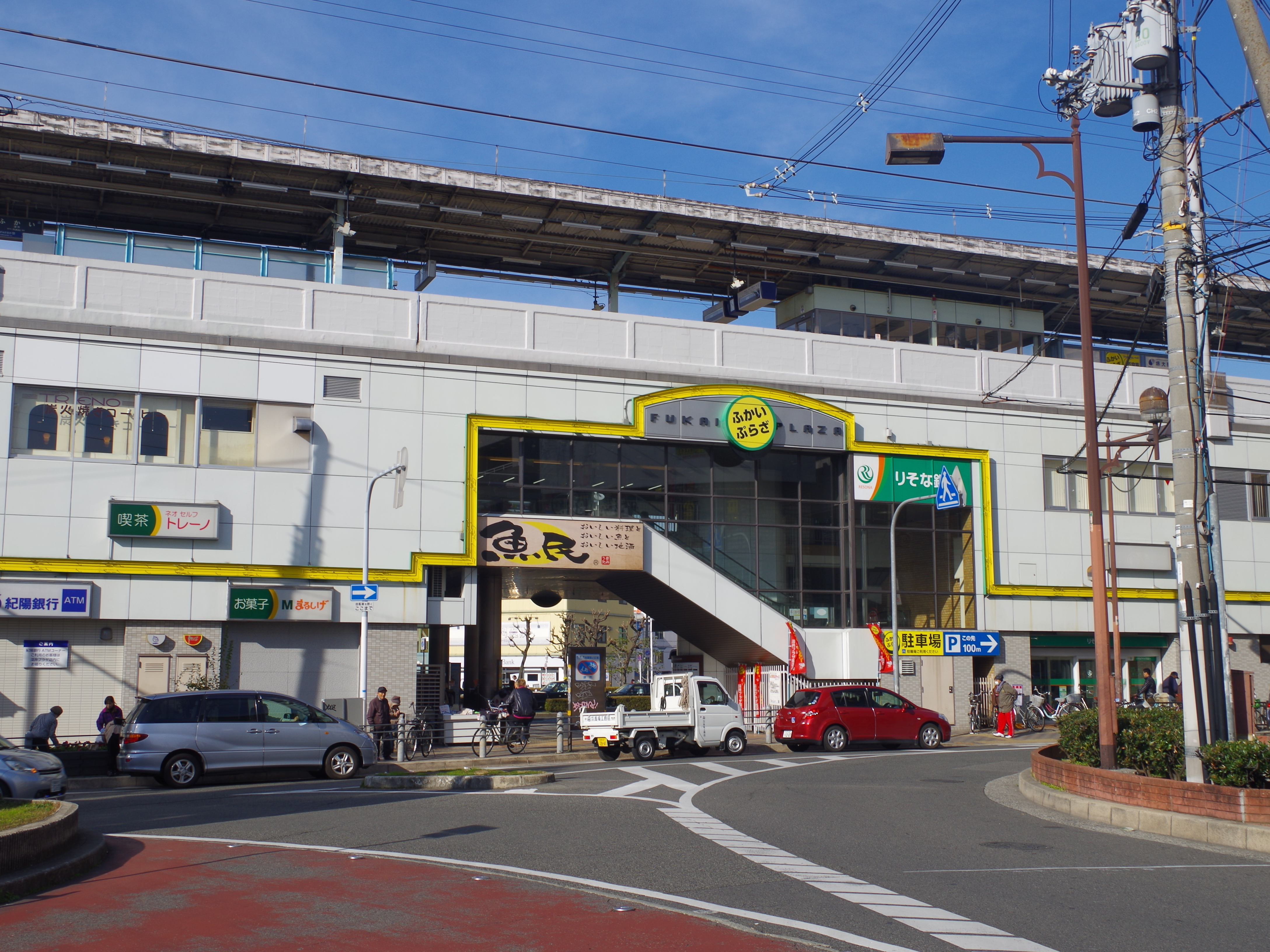 泉北高速鉄道線 深井駅(東口) Fukai station 2012.12.14